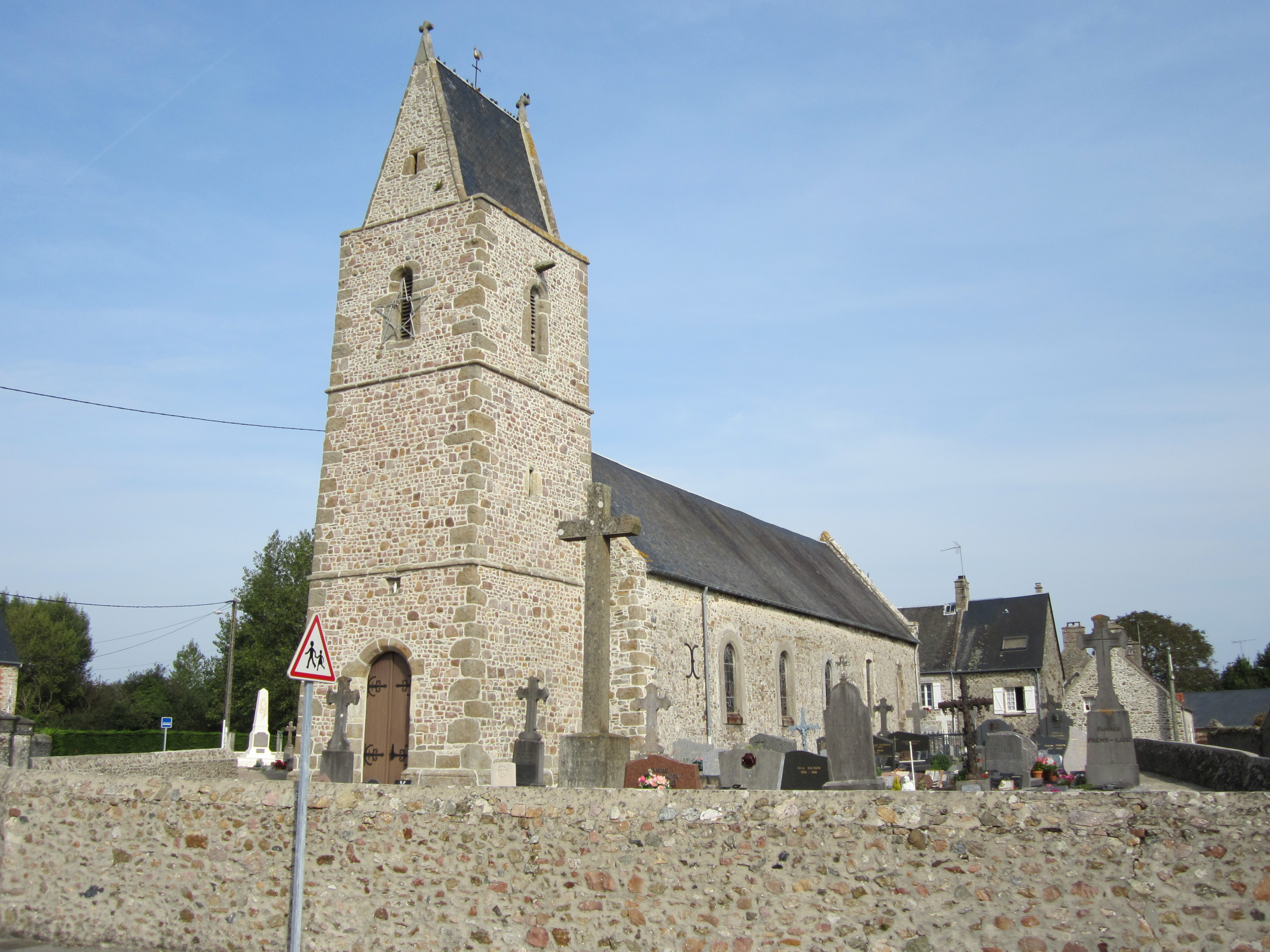 Église Saint-Samson d'Anneville-sur-Mer